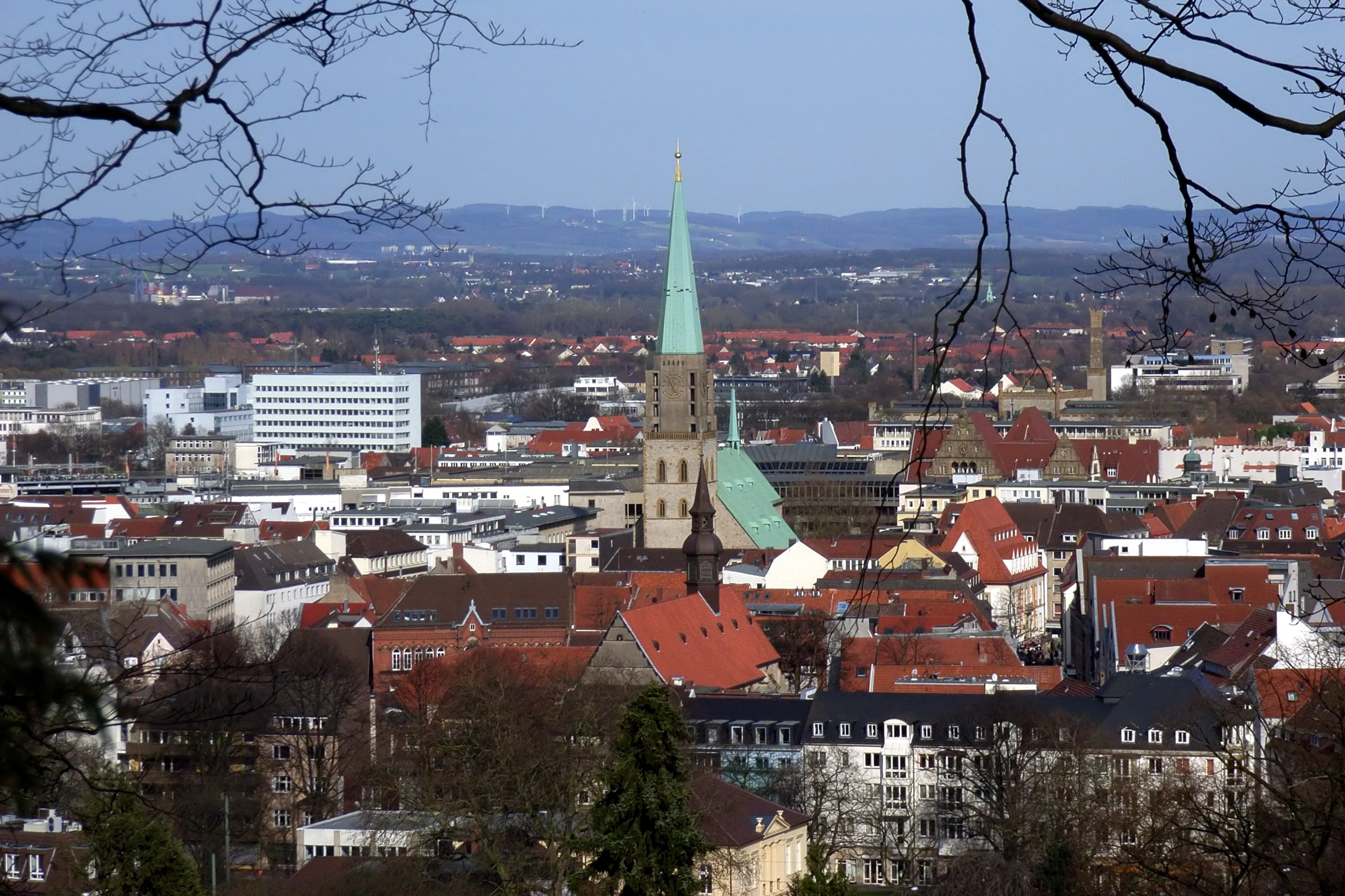 Bielefeld, Deutschland: Blick vom Johannisberg auf Bielefeld in Richtung Osten: Altstadt, Altstädter Nicolaikirche.